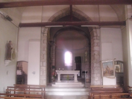 L'église Saint-Martin in Cossaye / Burgund (Département Nièvre)